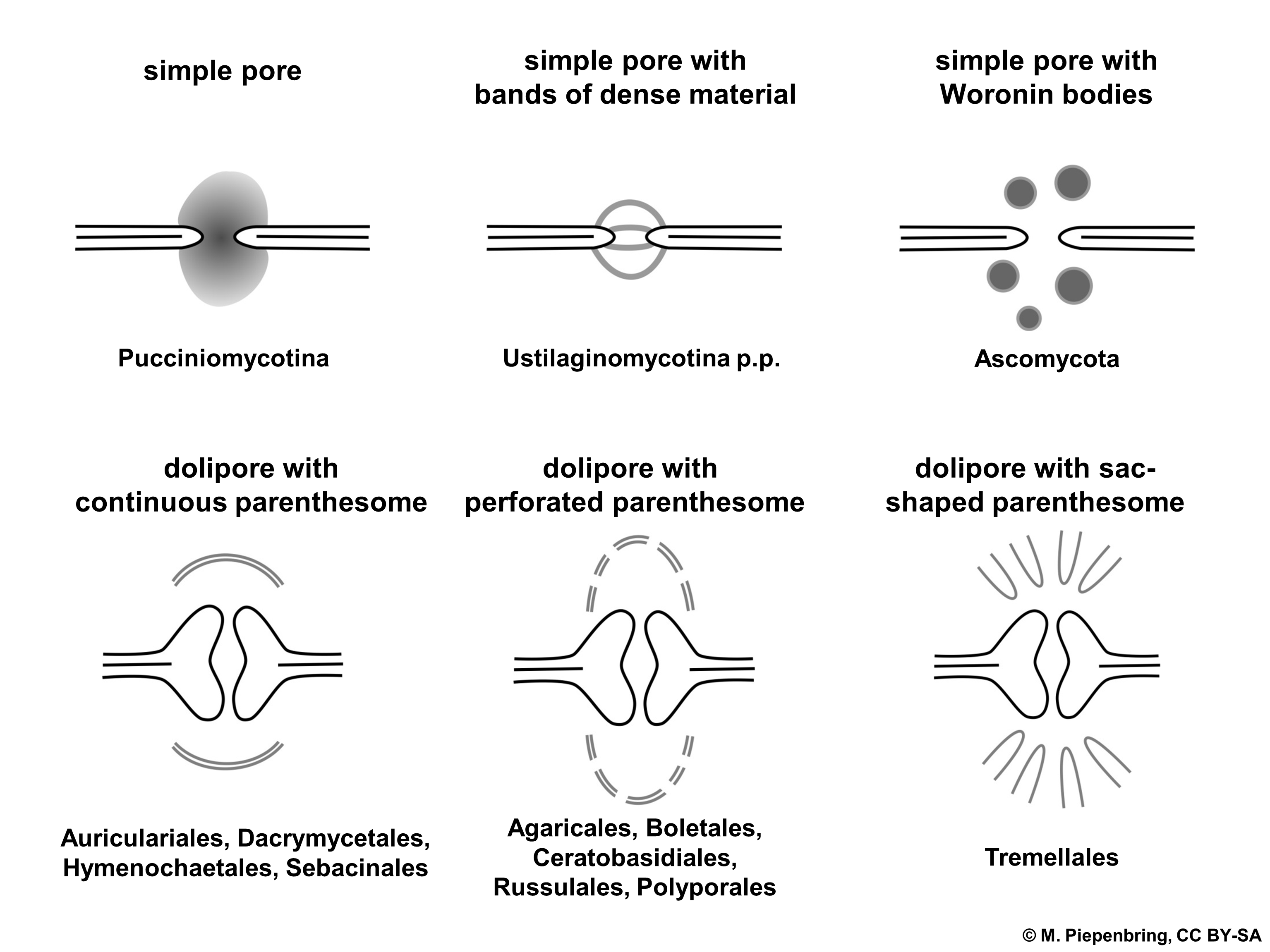 Biologische Schemata, gezeichnet und freigegeben von M. Piepenbring